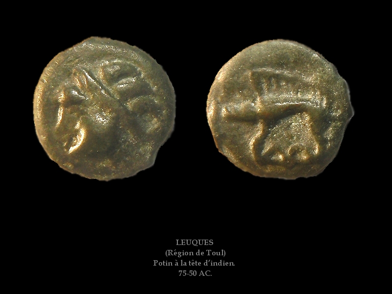 Potin à la tête d’indien,vers 75-50 AC.